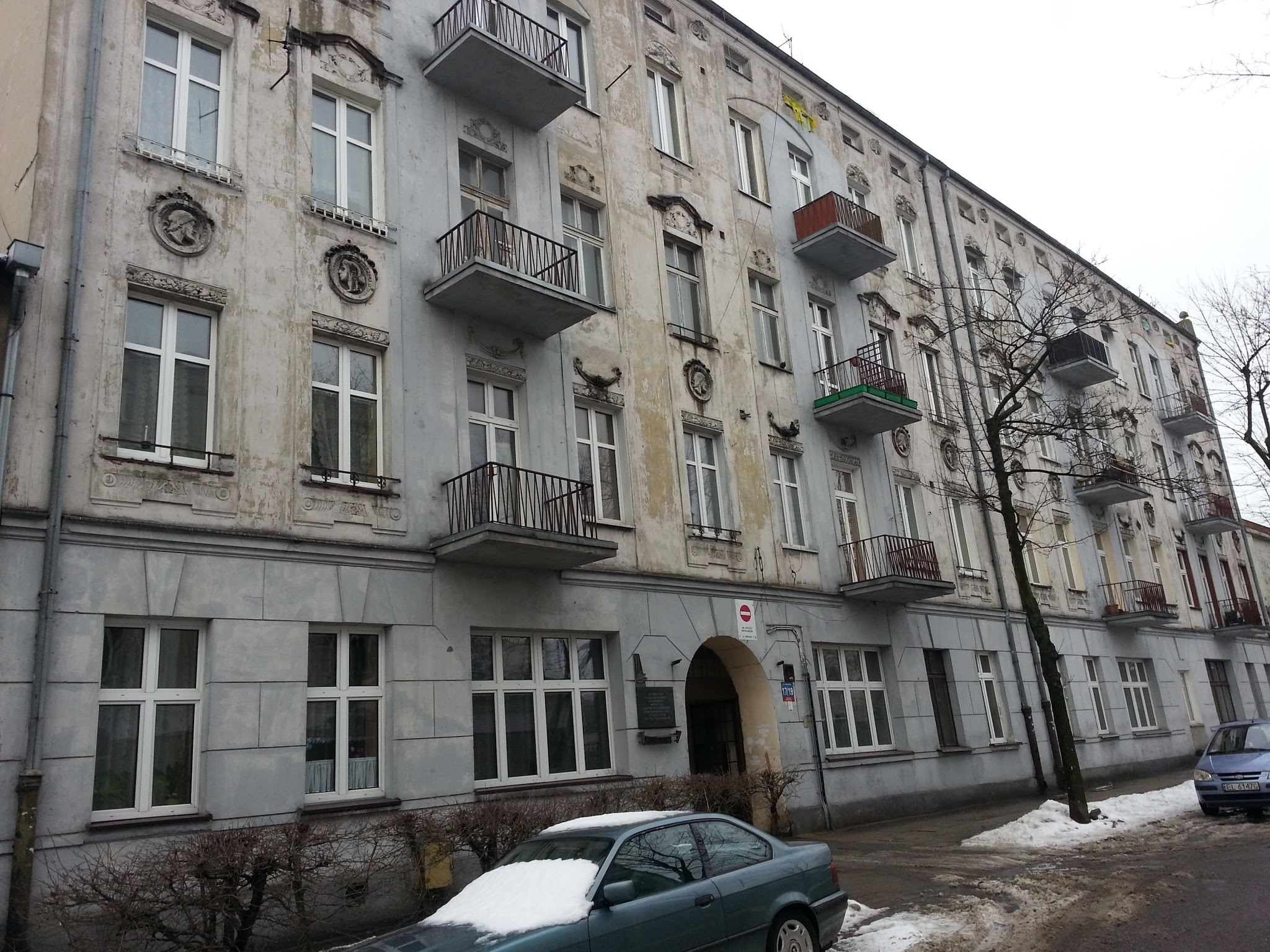 W tym domu w czasie okupacji hitlerowskiej mieścił się szpital dla Polaków, ul. Łomżyńska 17/19, Łódź Przy ulicy Łomżyńskiej 17/19 podczas wojny istniał szpital chirurgiczno-ginekologiczno-położniczy dla obywateli narodowości polskiej. Otwarcie nastąpiło 1-VI-1942r. Na elewacji budynku znajduje się stosowna tablica odsłonięta w roku 1981, za sprawą łódzkiej "Solidarności"- o treści: "W tym domu za czasów okupacji hitlerowskiej mieścił się szpital dla Polaków, który bronił nie tylko zdrowia i życia, ale i wolności rodaków". Obecnie kamienicę zamieszkują lokatorzy.